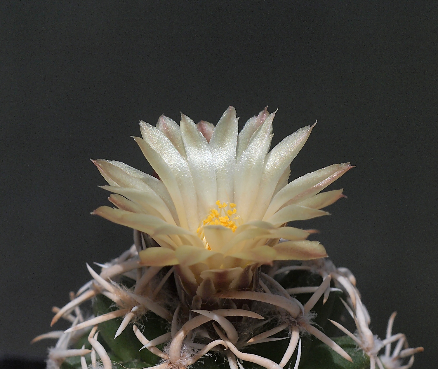 Navajoa peeblesiana v. maia, s Cameron, Az